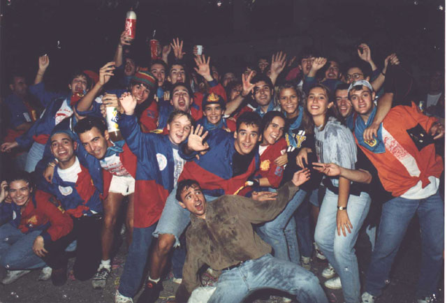 Foto de la Peña ZOS de Monzón durante el desfile de Carrozas de las Fiestas de San Mateo